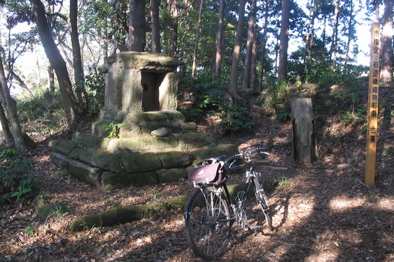 市の文化財指定の石廟